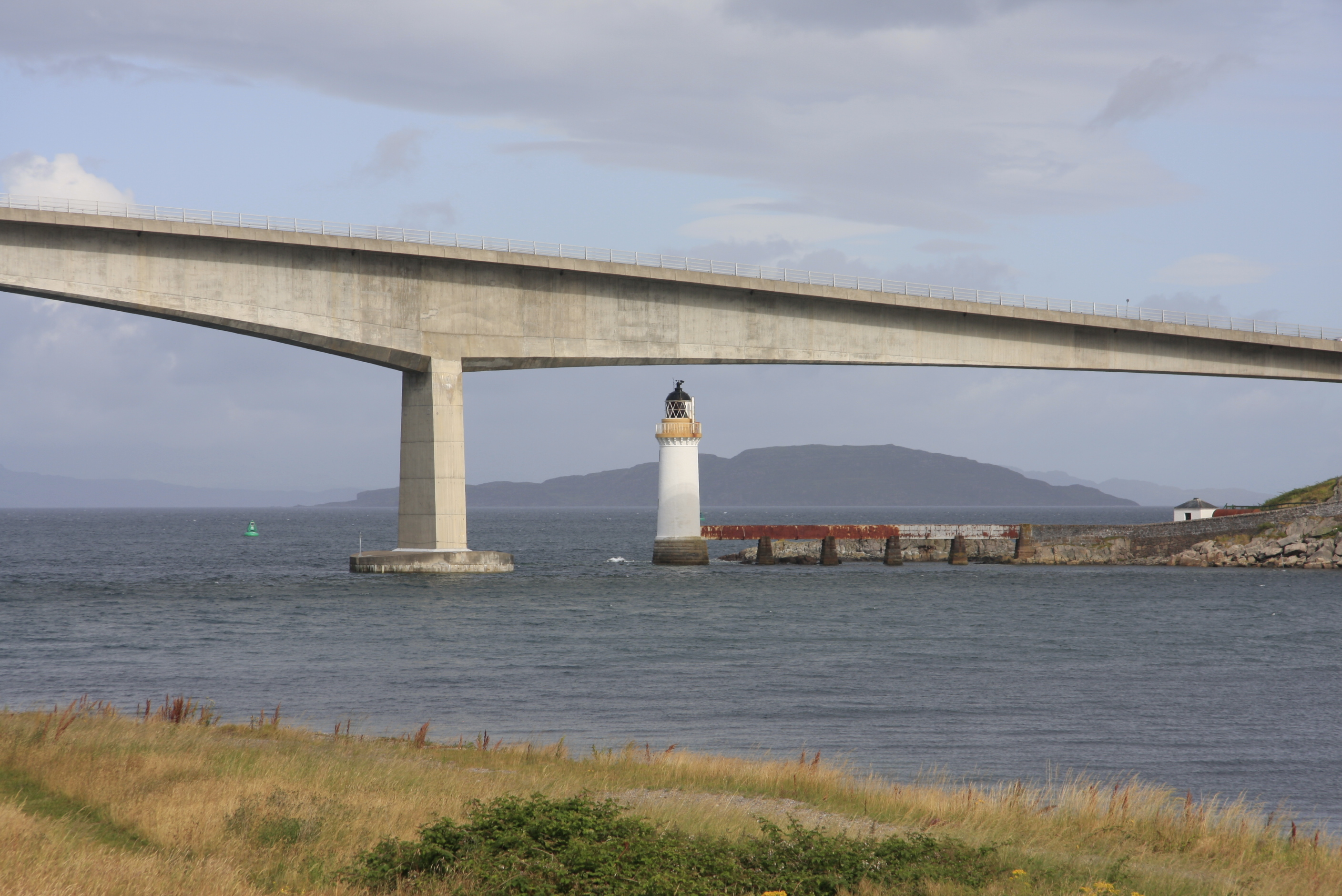 _MG_3637